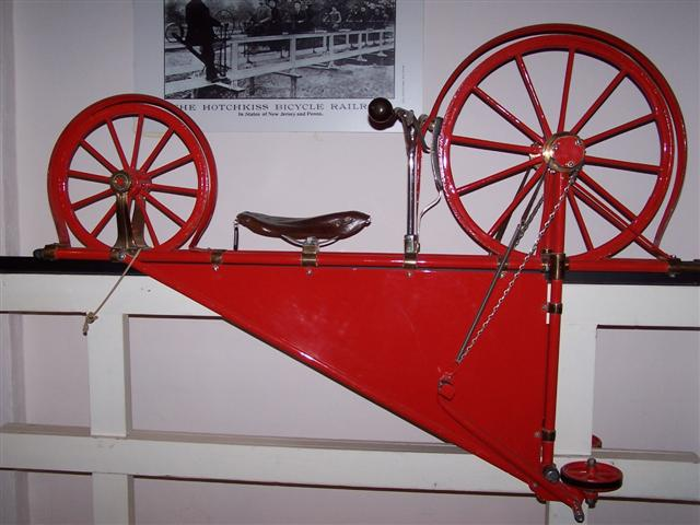 1890s Arthur Hotchkiss Bicycle Railroad, ausgestellt im Museum Velorama in Nijmegen